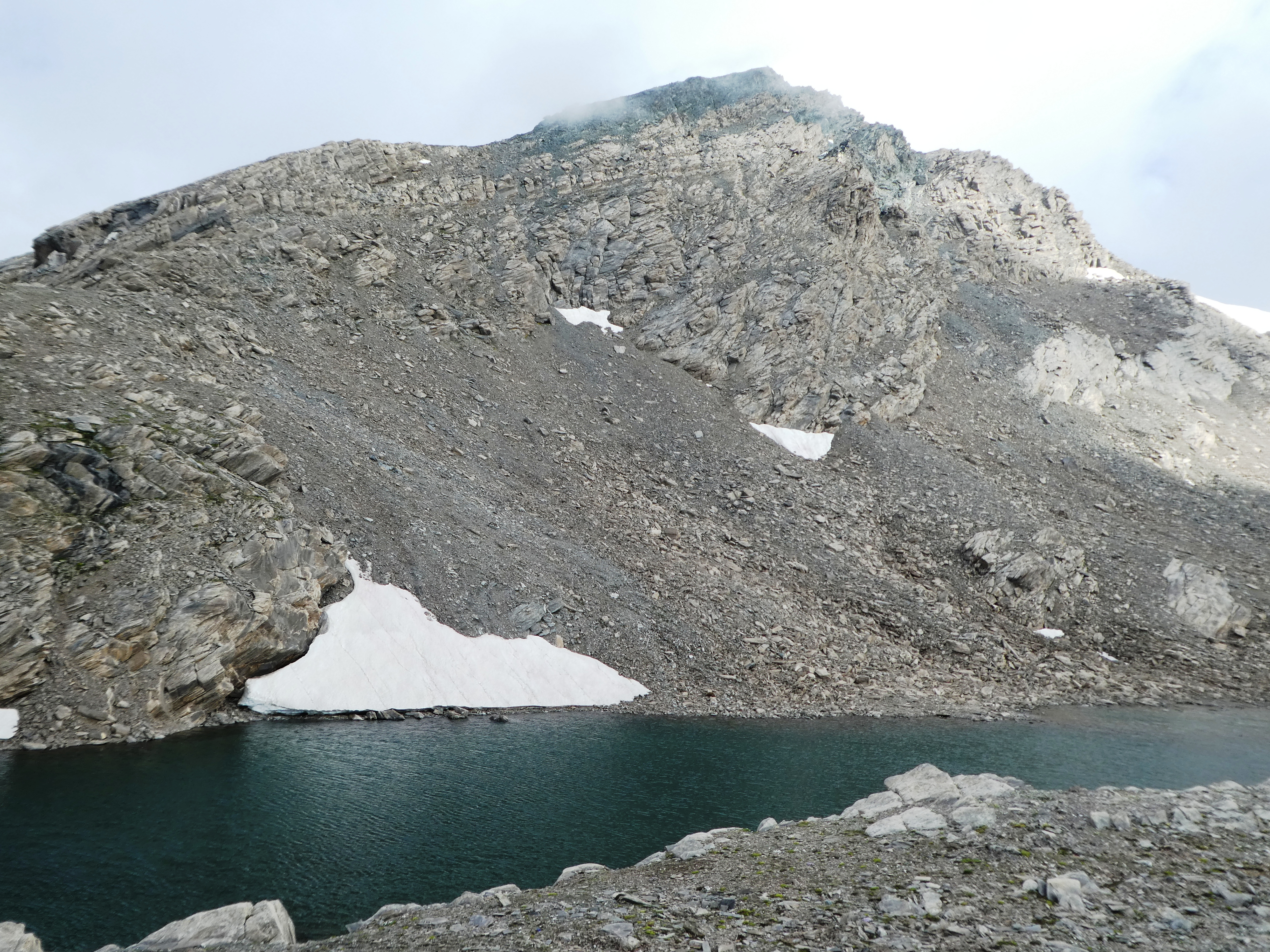 La Cima Mongioia con ai suoi piedi il lago Mongioia